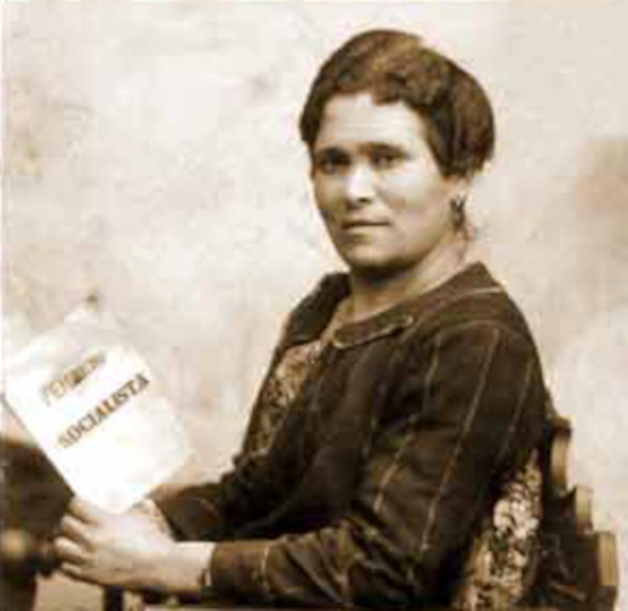 Única fotografia de María Cambrils Sendra.